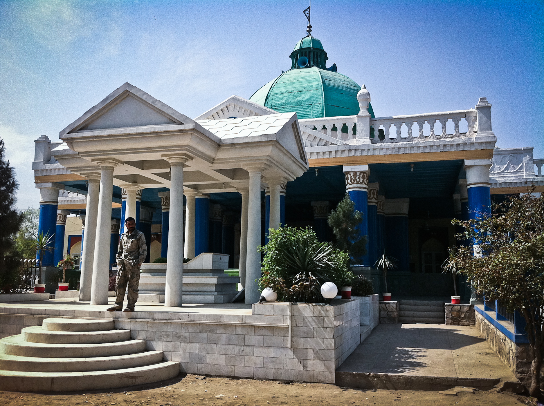 Mausoleum of King Amanullah Khan in Jalalabad, Afghanistan.